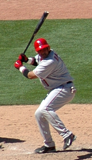 Bengie Molina